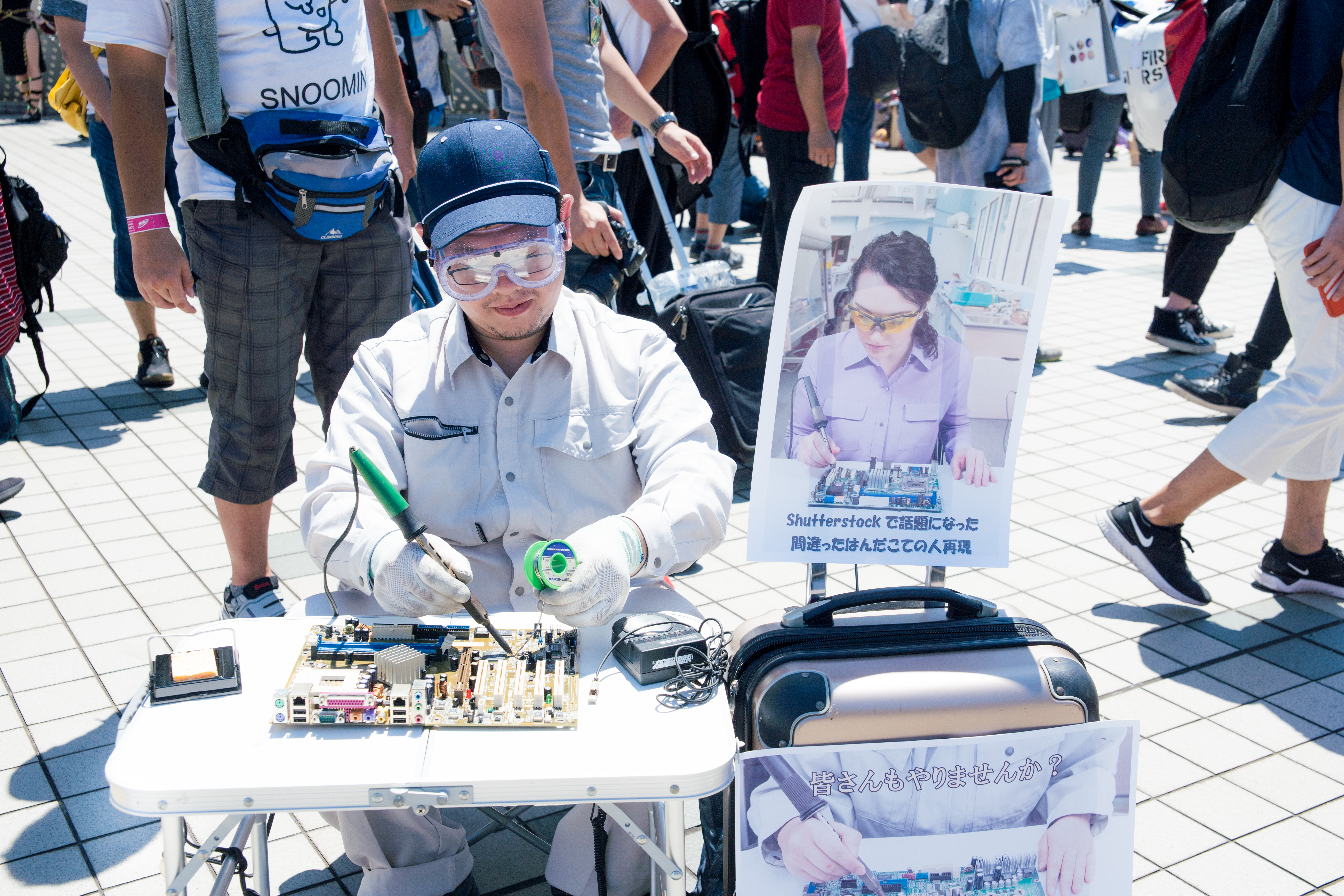 コミックマーケット96 3日目 コスプレイヤー